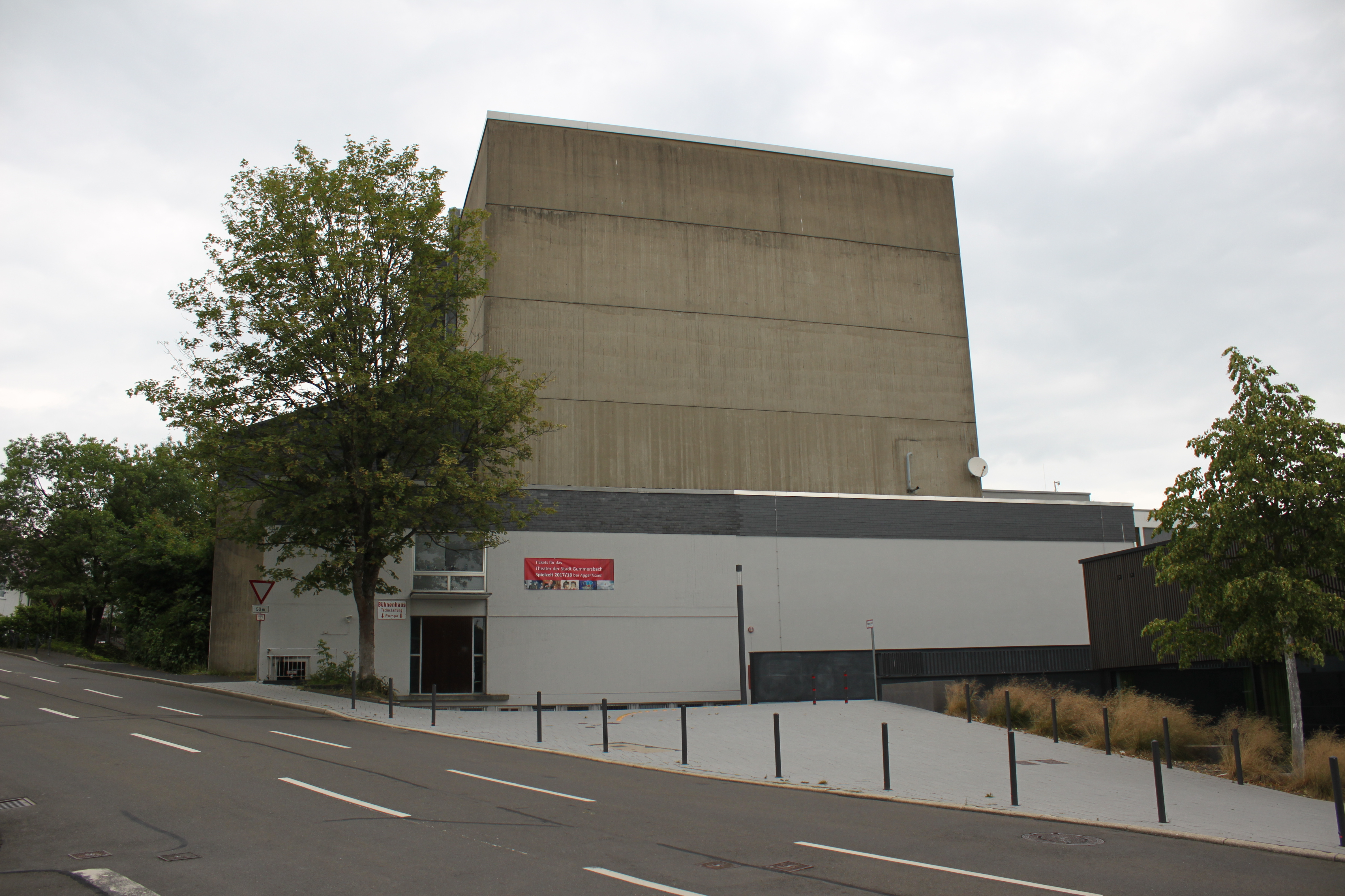 Anlieferungsrampe, Bühneneingang Süd (Moltkestraße), Bühnenturm